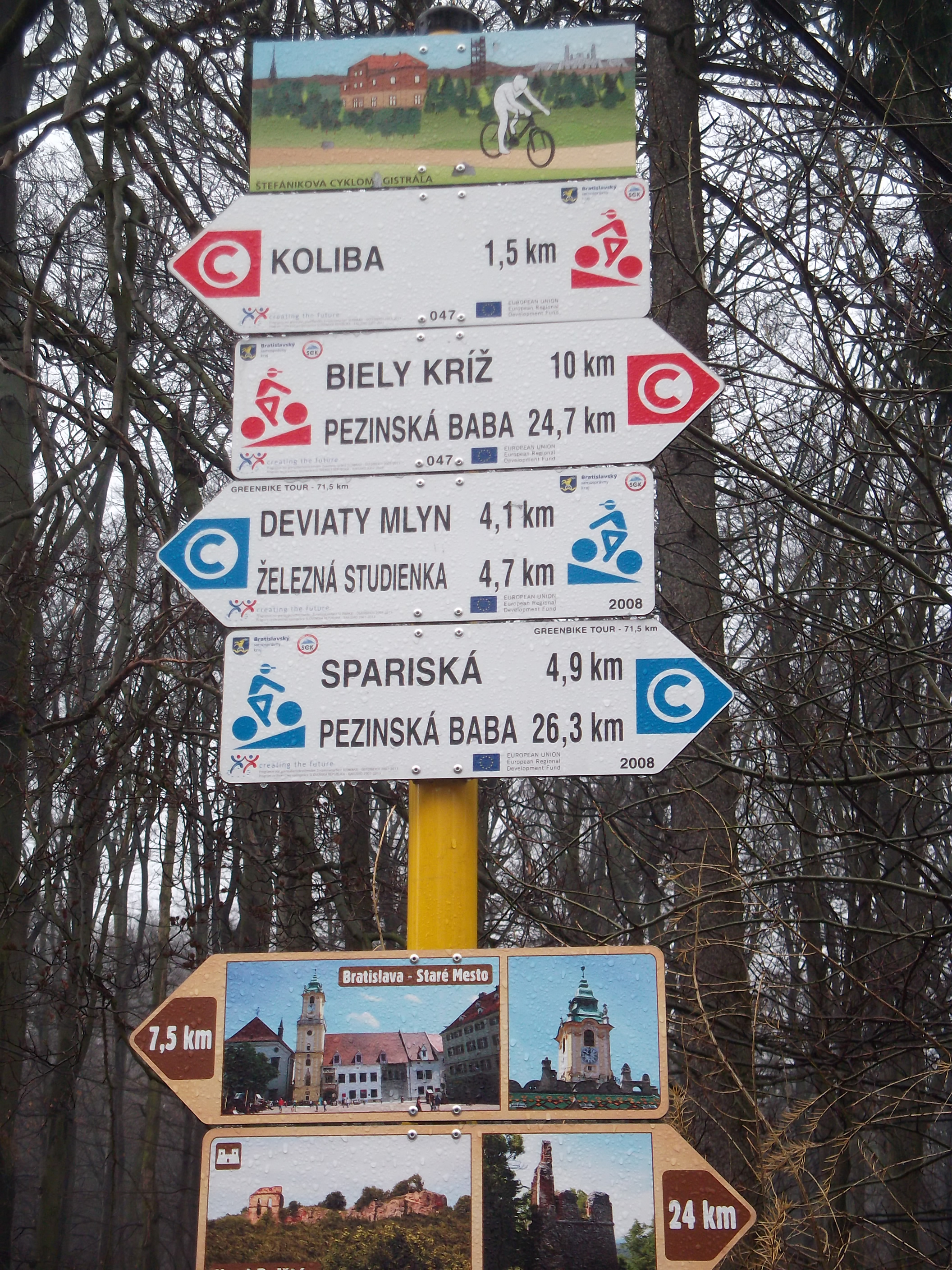 Orientačné značenie Štefánikovej cyklomagistrály na Kamzíku